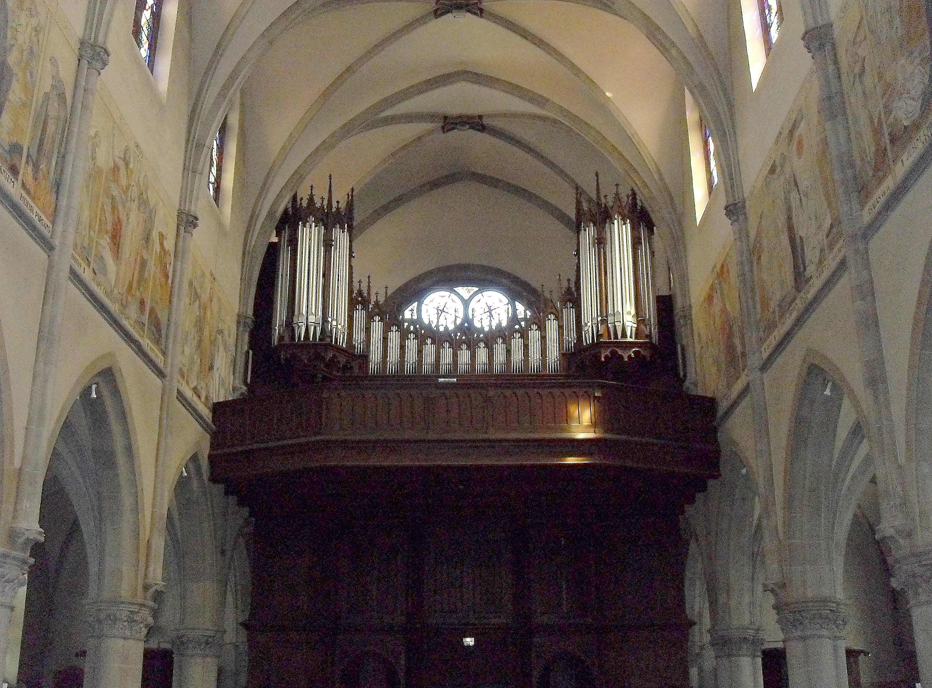 L'orgue par Joseph Rinckenbach à partir de 1927 dans l'église Saint-Étienne à Cernay